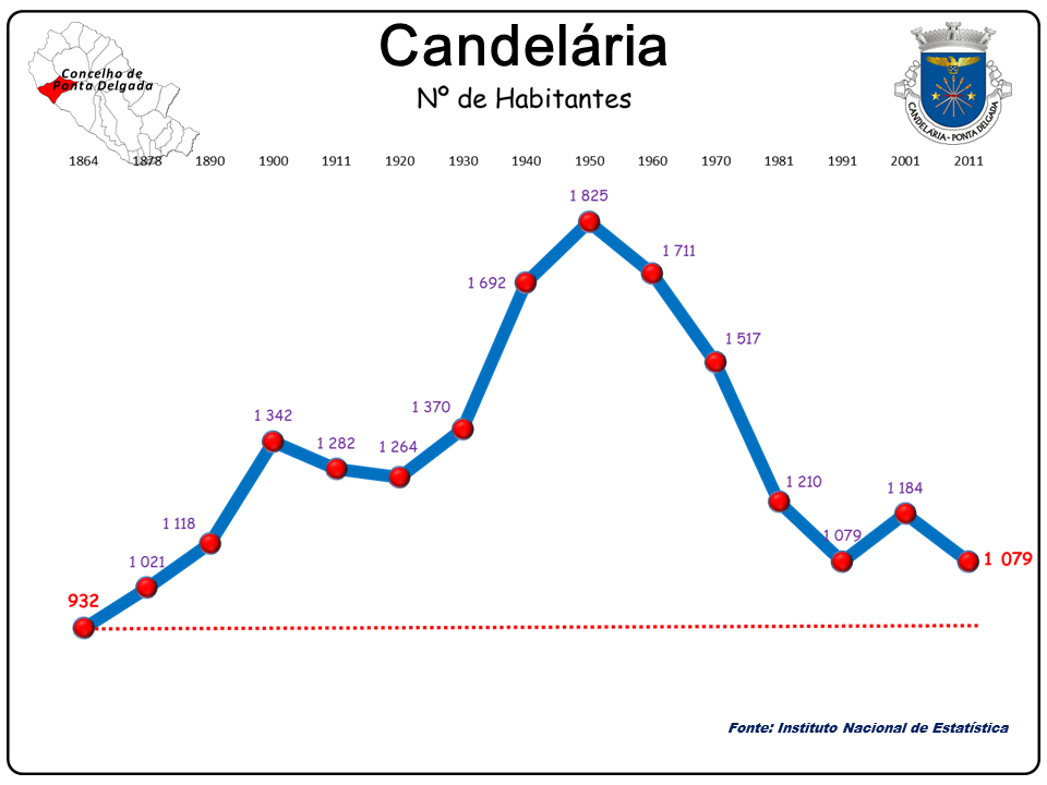 População